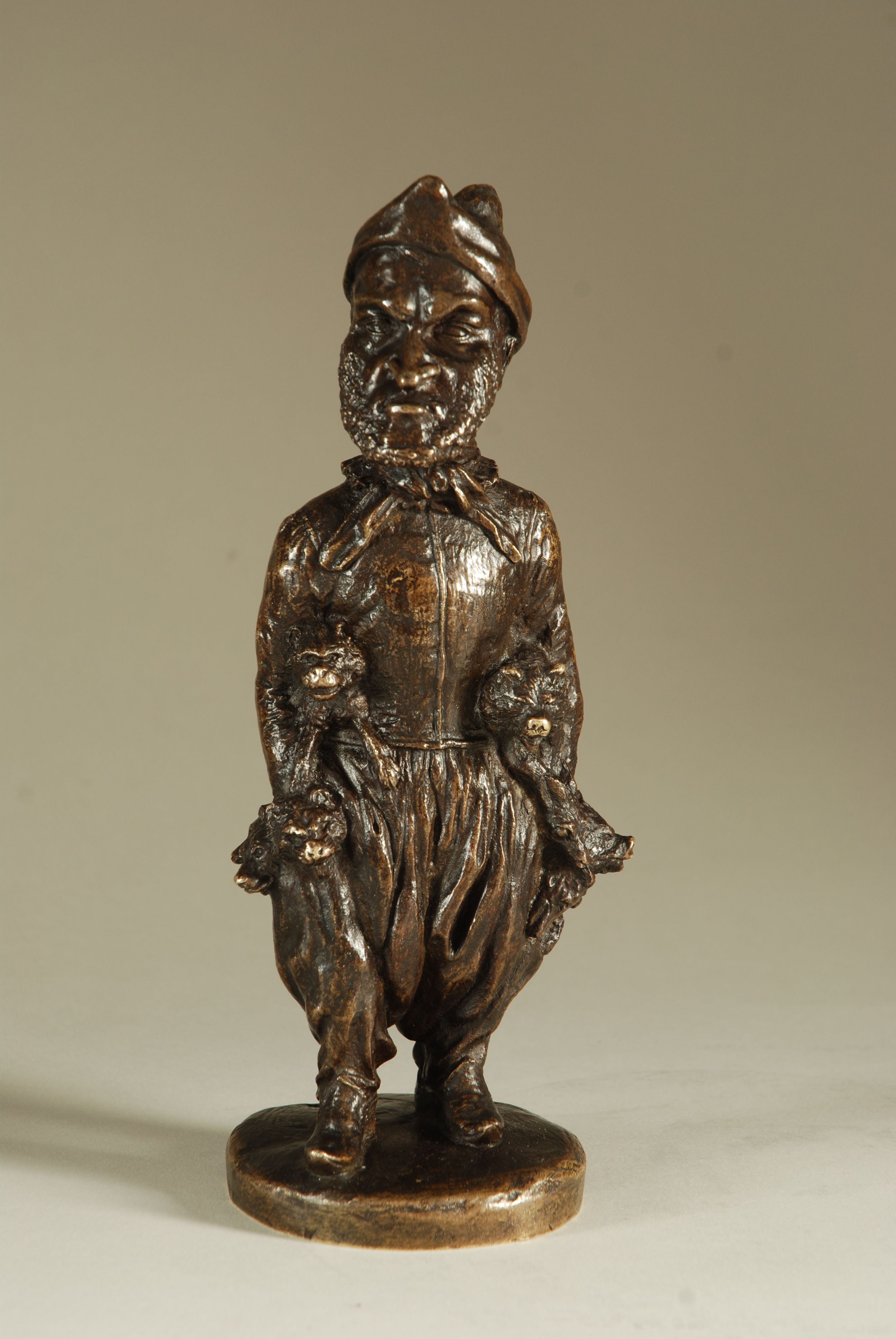 Fratin Fratin par lui-même